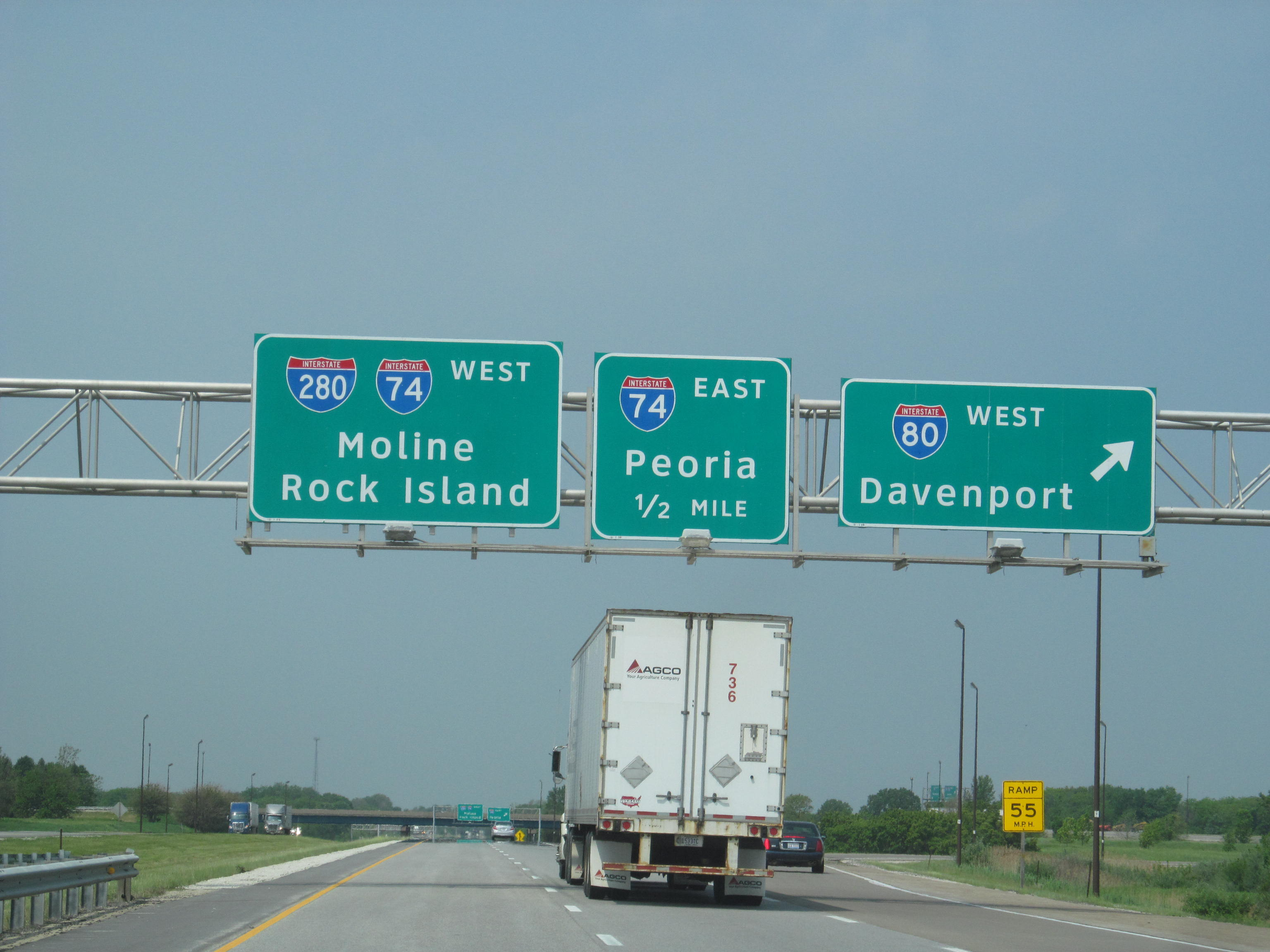 T-80 IL